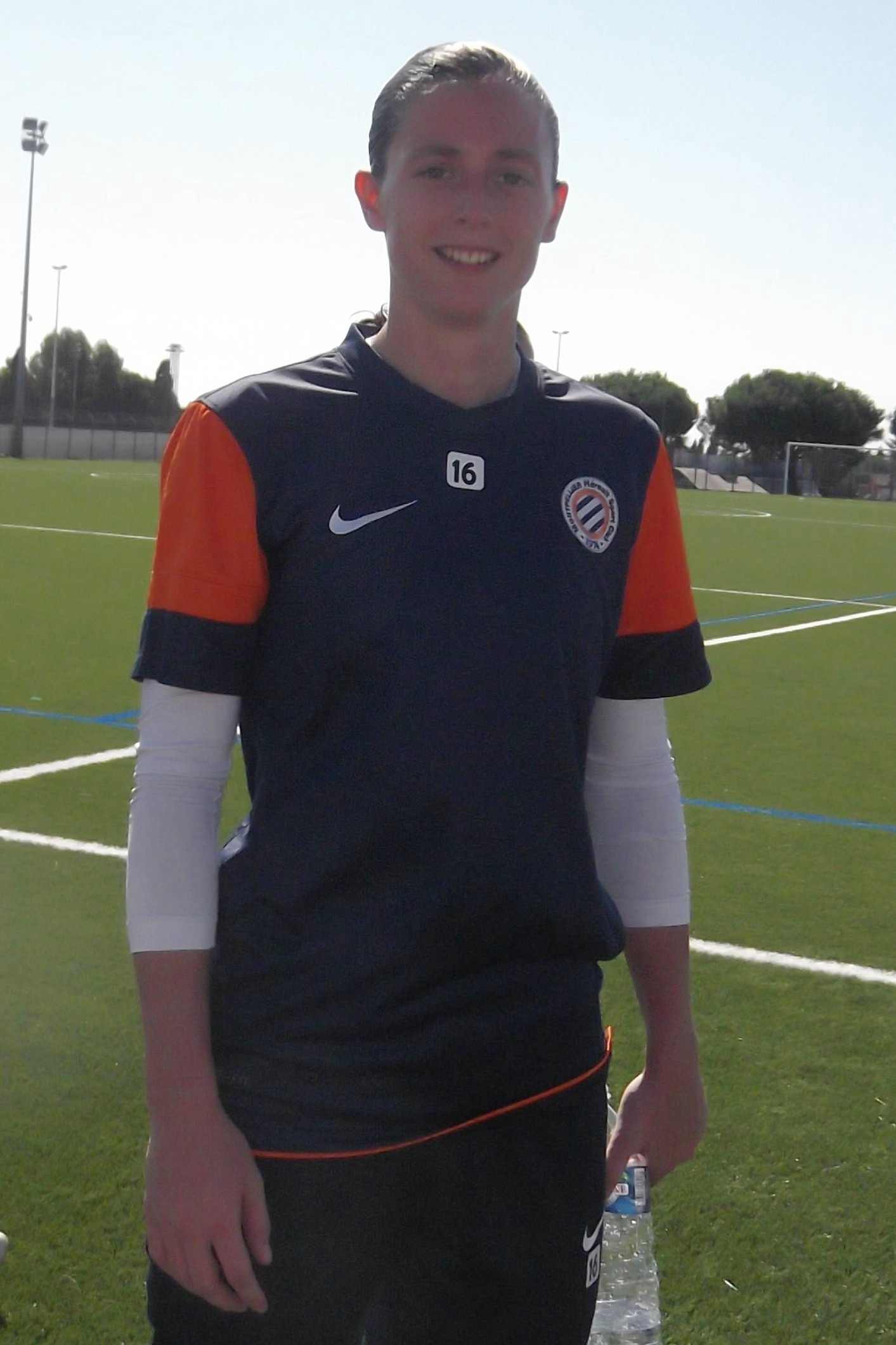 Lætitia Philippe, août 2013.